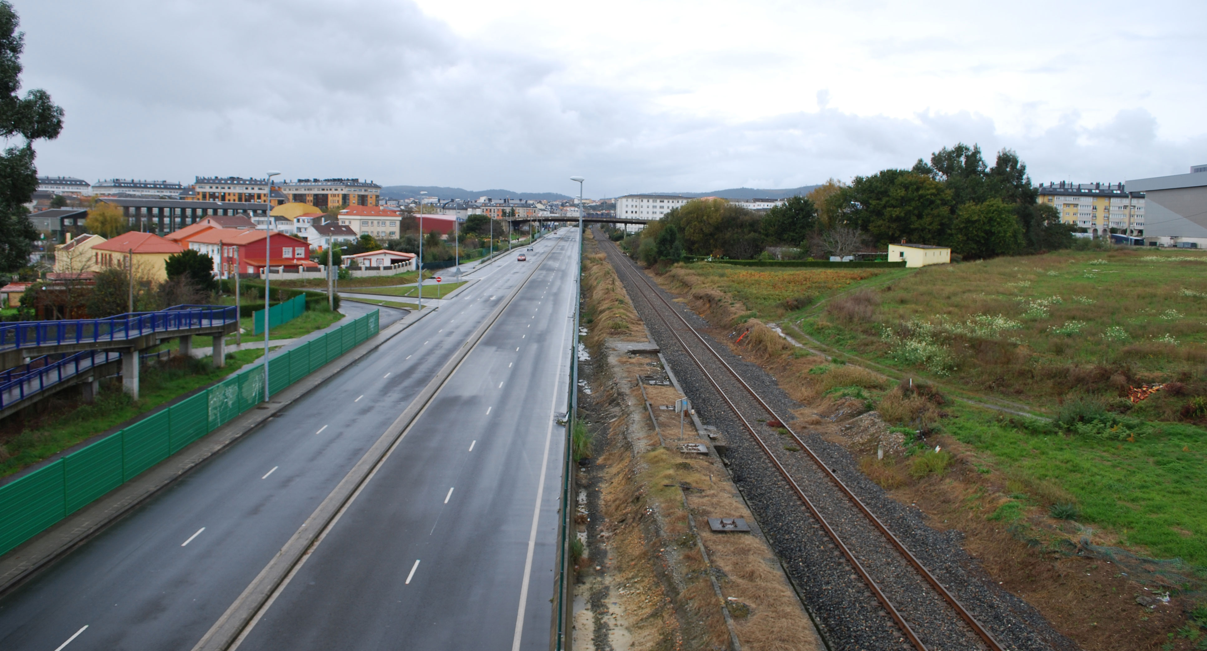 Vista da Trincheira dende o paso elevado do Colmeote A Gándara Concello de Narón A Coruña Galiza Spain